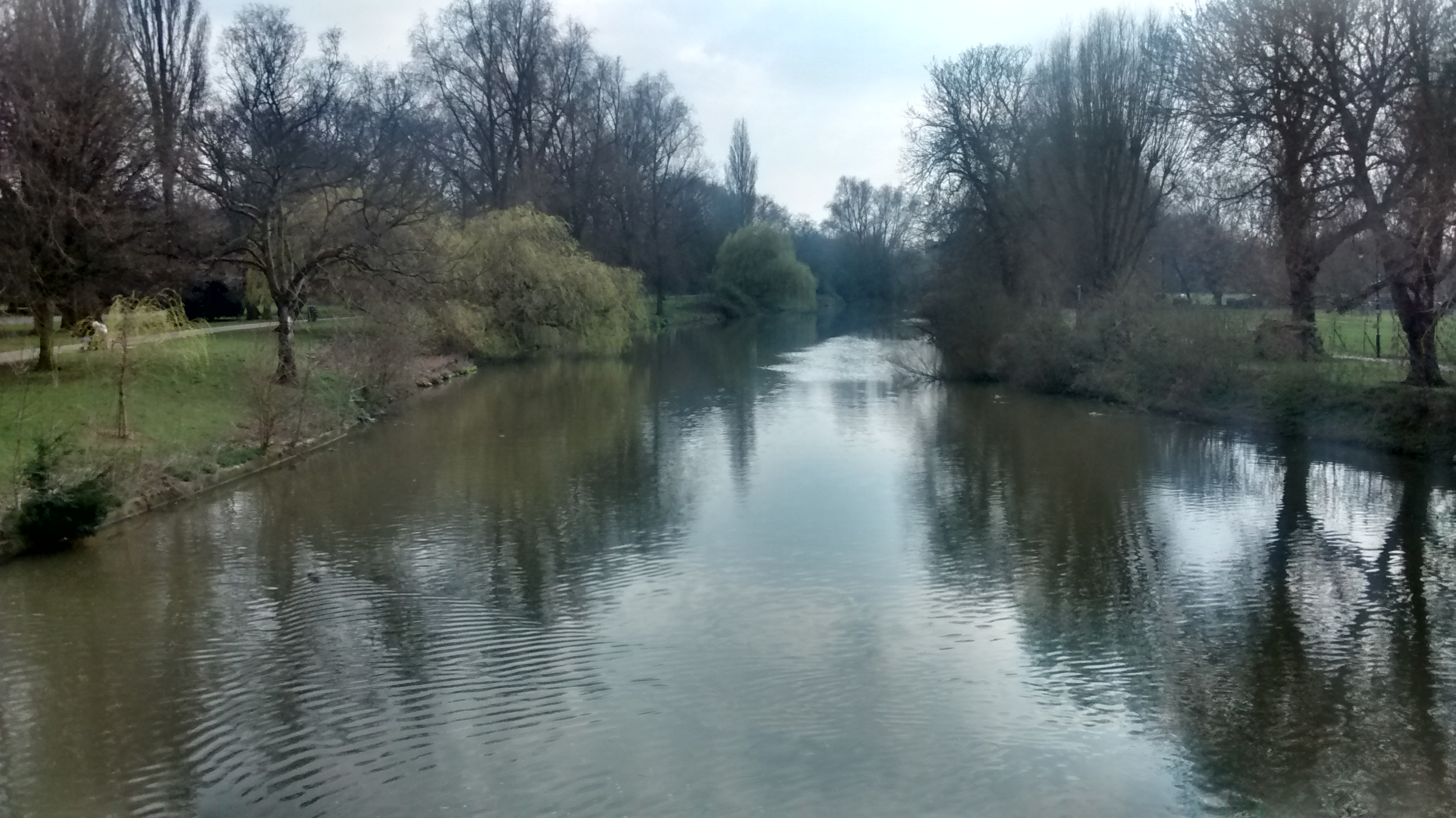 Rzeka Soar w Parku Abbey (Leicester)